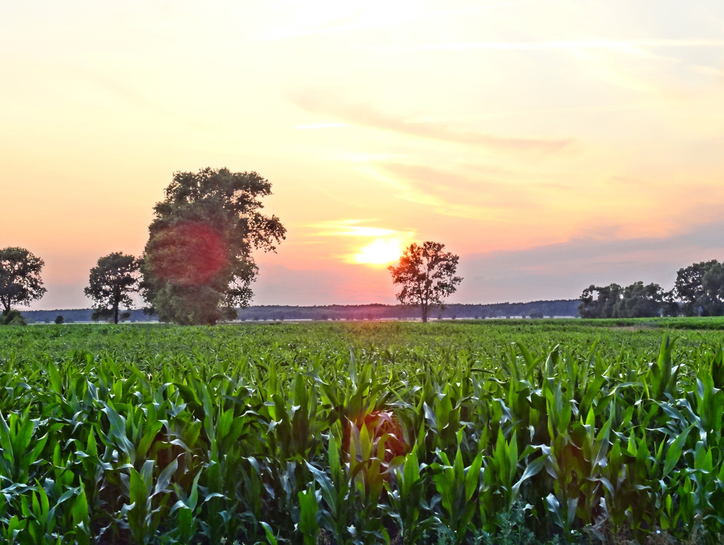 Dziemionna, gmina Nowa Wieś Wielka, powiat bydgoski